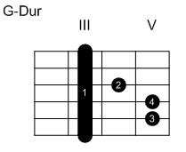 Eigenanfertigung